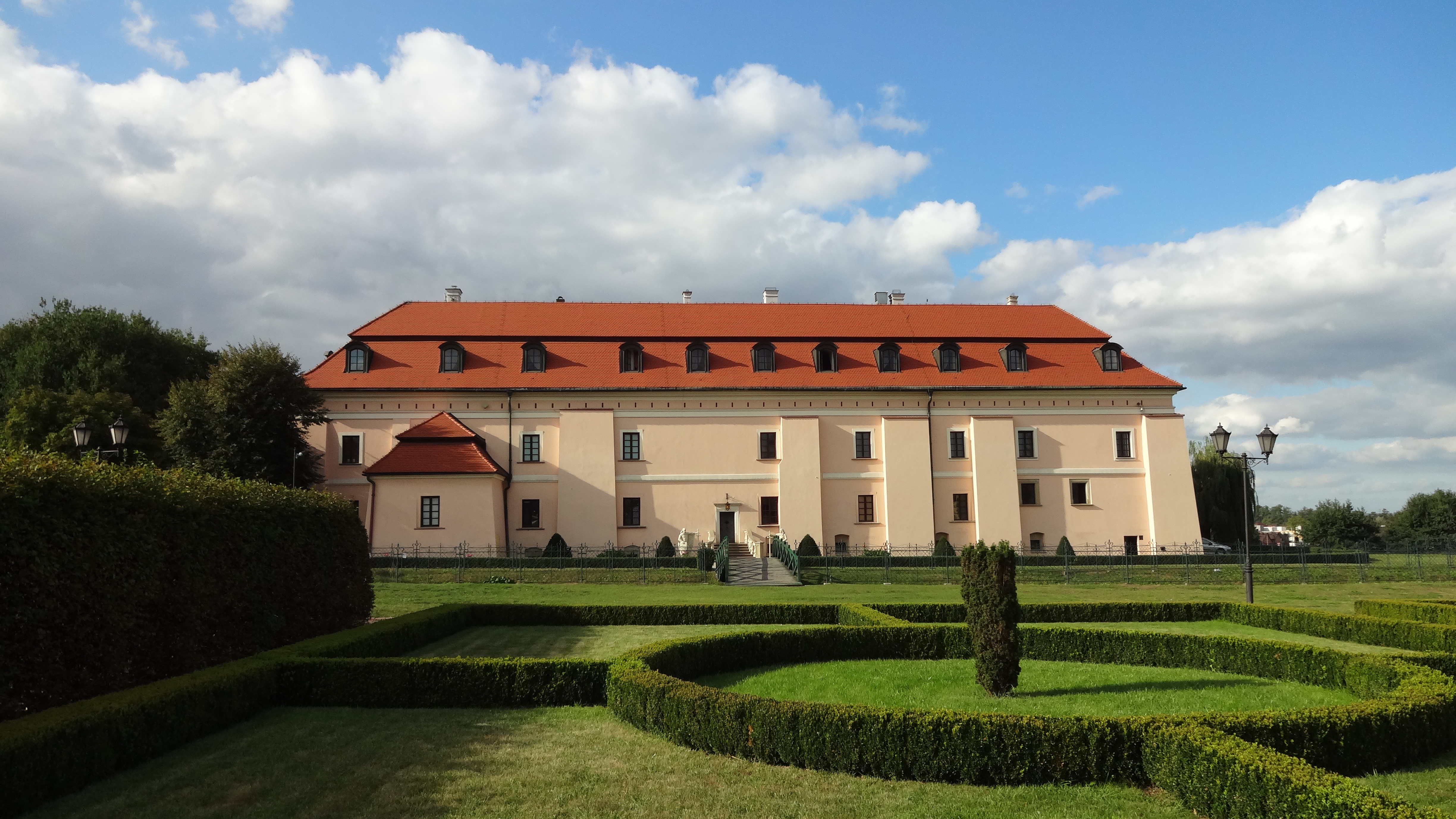 Zamek Królewski Niepołomice, Niepołomice